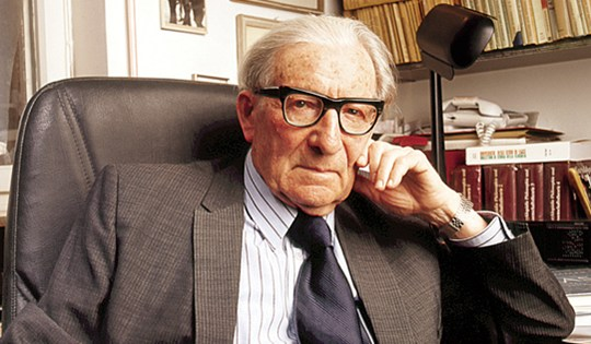 פרופסור להיסטוריה משה ימר